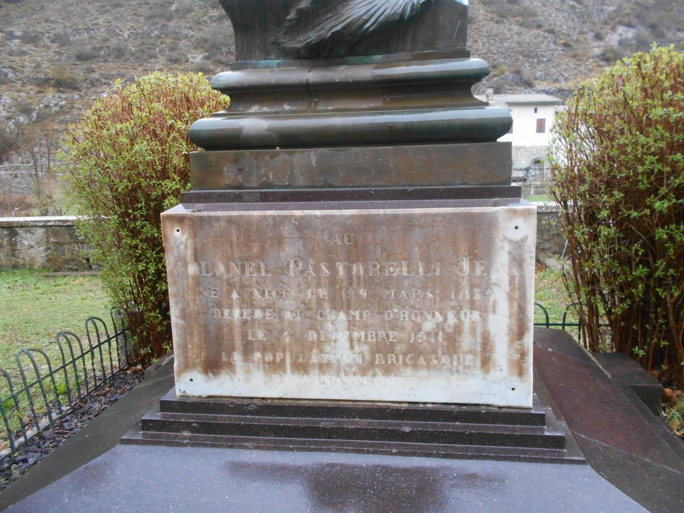 Monumento a Giovanni Pastorelli, Briga Marittima / La Brigue (Francia)